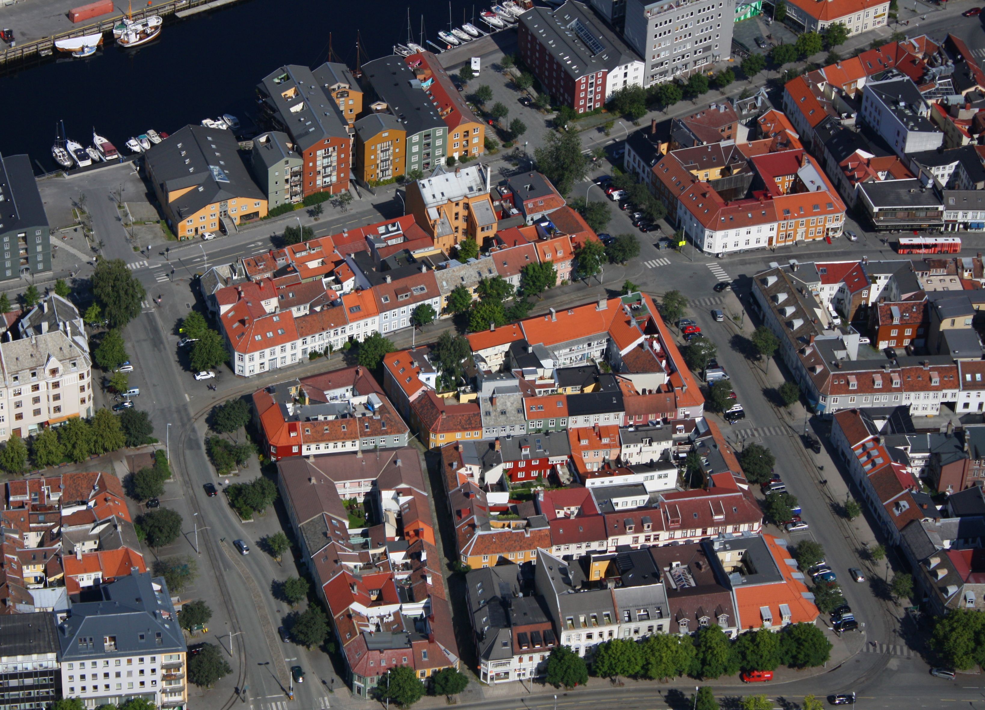 Oversiktsbilde fra Trondheim sentrum.